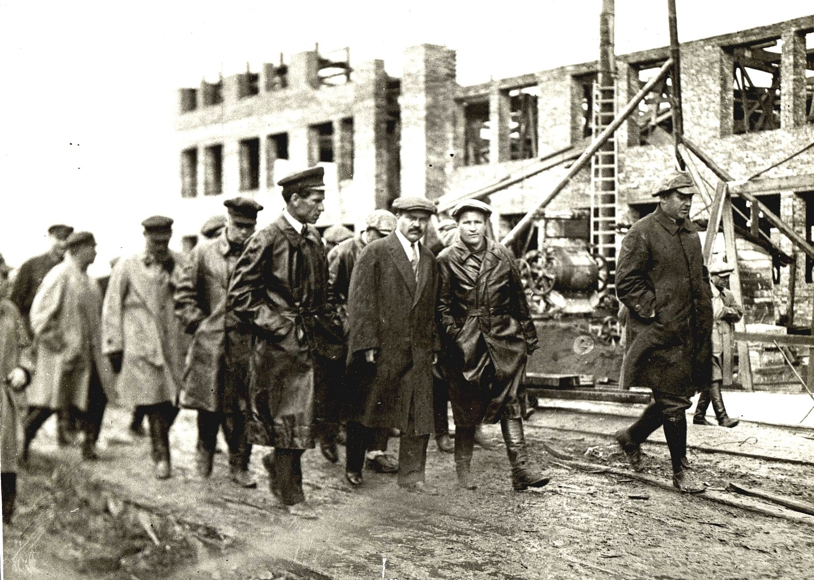 визит Вячеслава Михайловича Молотова в г. Пермь, на строительстве завода №19 ,отчитывается заместитель директора завода по строительству Дмитрий Иванович Плотников.